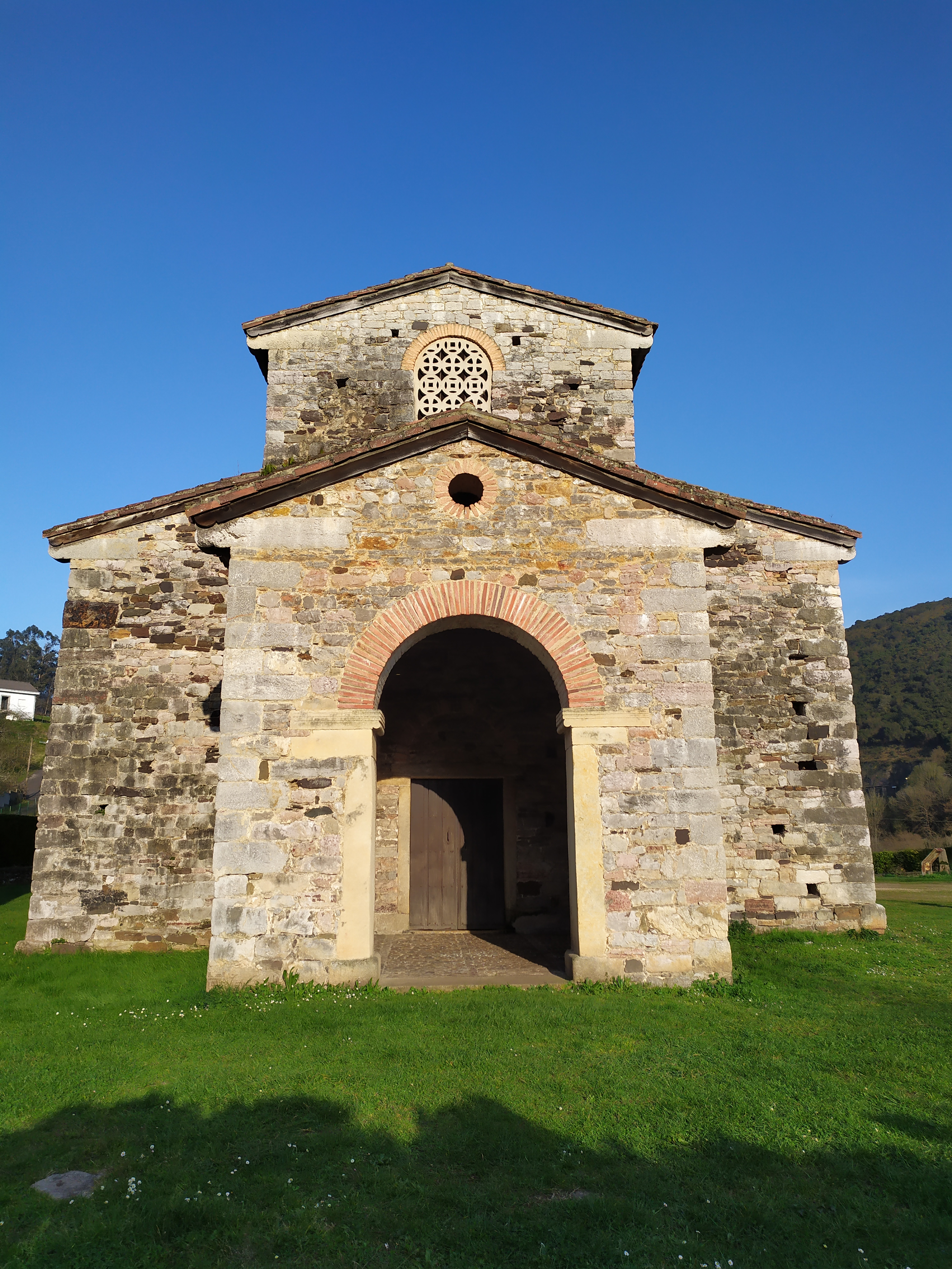 Pies de San Pedro de Nora; Pórtico rectangular. Archivo de Andrés González Iglesias